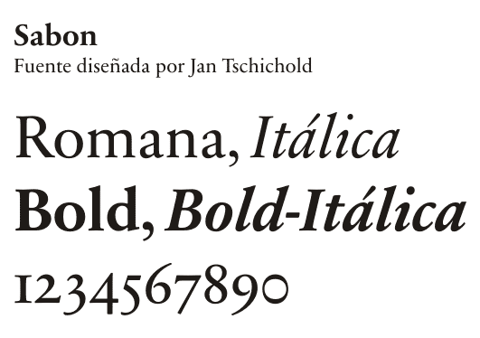 el autor de la fuente es Jan Tschichold pero la imagen la hizo el usuario Jaques Sabon. título: fuente sabon autor: Jaques Sabon año de publicación: 2005 lugar: Bogotá, Colombia